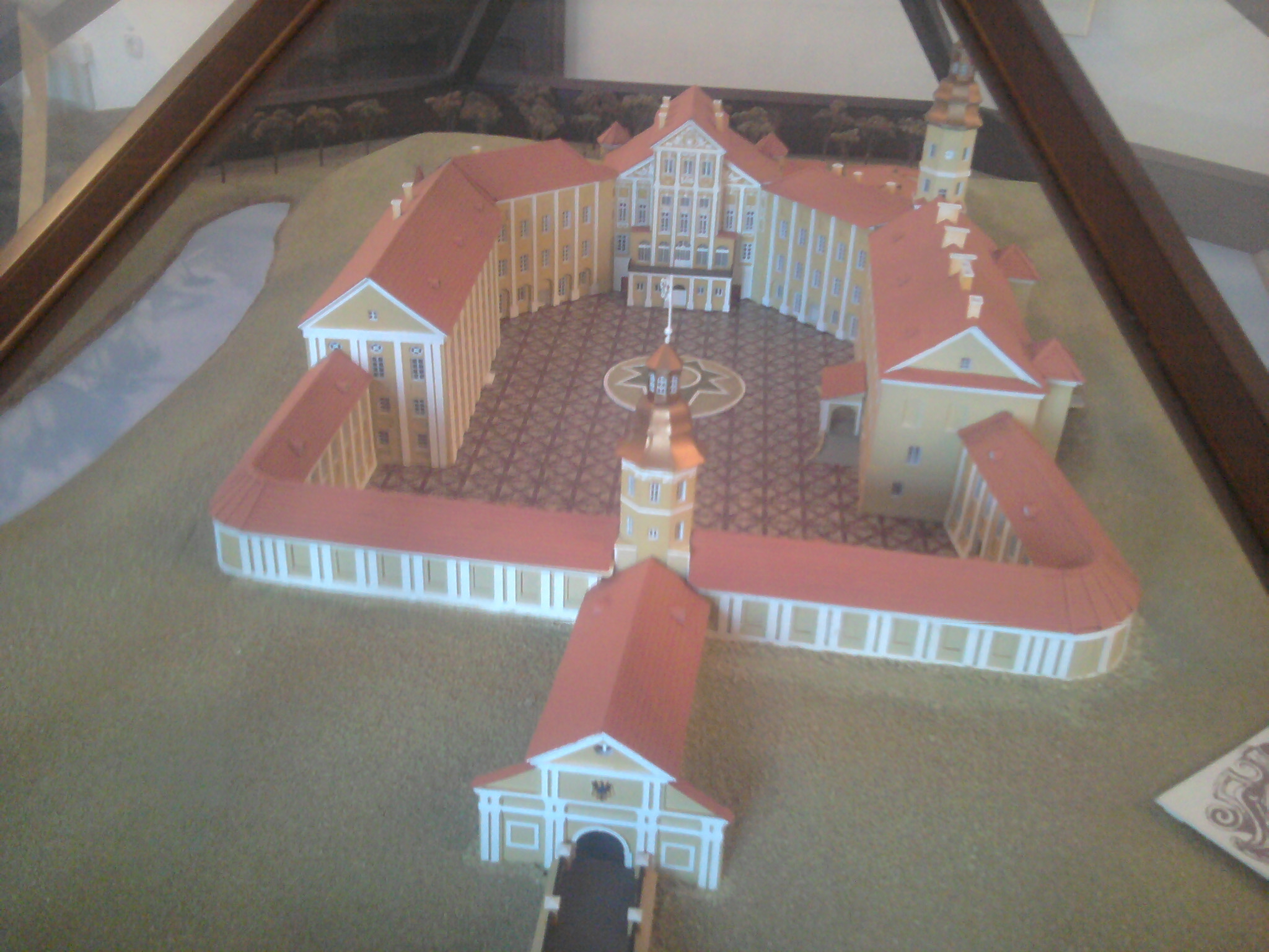 Беларуская (тарашкевіца): Палацава-паркавы ансамбль:замак-палац, паўднёвая і ўсходняя галерэі, камяніца, арсэнал з капліцай, брама, два прыбрамныя корпусы, паўночна-ўсходняя і паўднёва-заходняя галерэі, лядоўня, стайня;абарончыя збудаваньні і мост;тэрыторыя паркаў:Замкавы, Стары, Японскі, Ангельскі, Новы;водная сыстэма:Дзікі, Замкавы, Бэрнардынскі ставы. г. Нясьвіж This is a photo of Belarusian heritage monument. Reference number: 610Г000466 ( WLM)